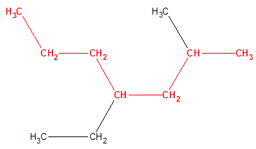 2 etylo 4 metylo heptan